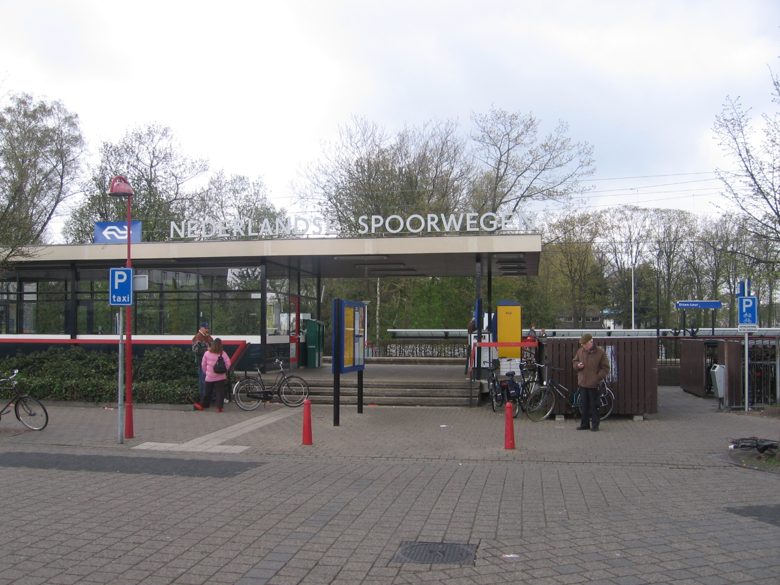 Zicht op een deel van het Station Etten-Leur, Stationsplein, 4872 XL Etten-Leur